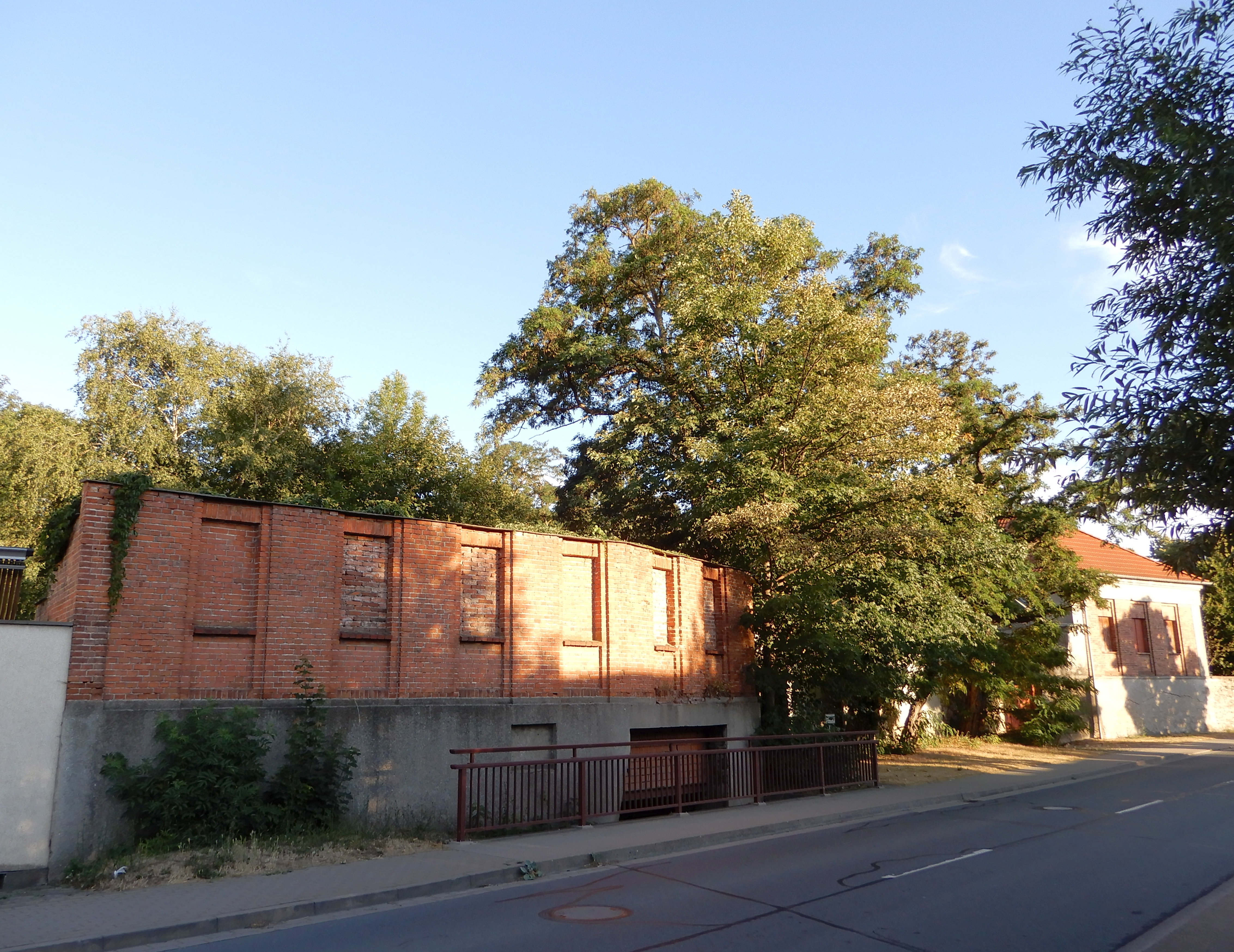 Schloßmühle, Constabelsche Mühle